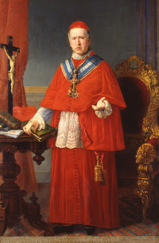 Retrato del eclesiástico español Miguel Payá y Rico (1811-1891), que fue arzobispo de Santiago de Compostela y de Toledo, cardenal de la Iglesia Católica y primado de las Españas.